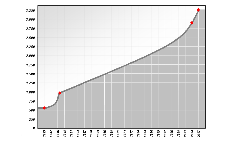 Einwohnerentwicklung Escheburgs